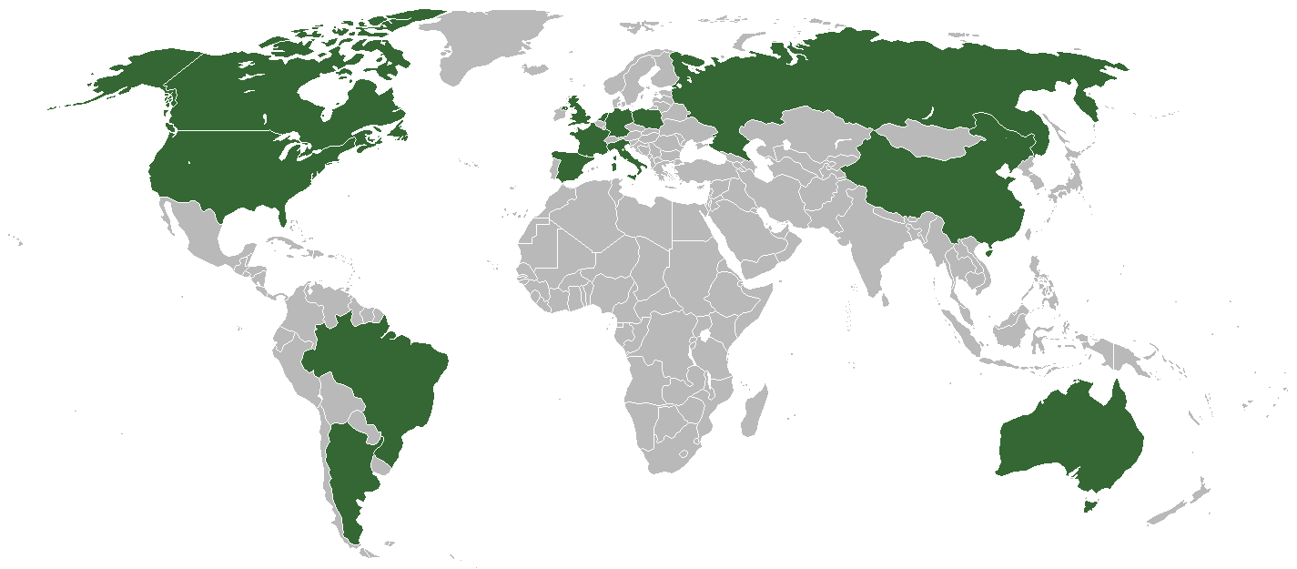 Google Video localization